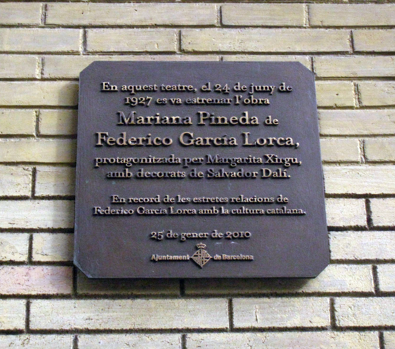 Federico García Lorca. C. Joaquim Costa, 68 -façana Teatre Goya- (Barcelona)